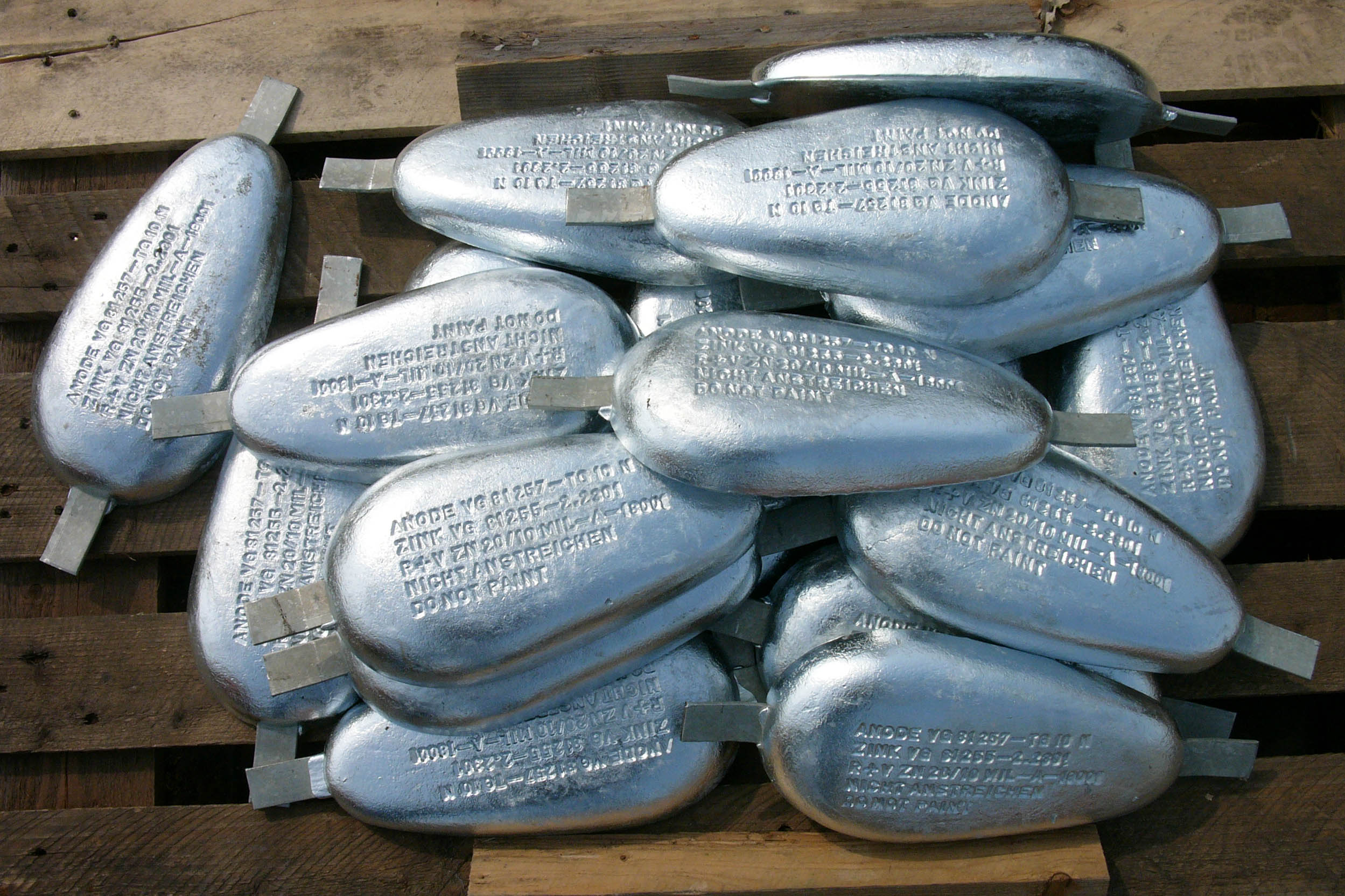 Galvanic anodes